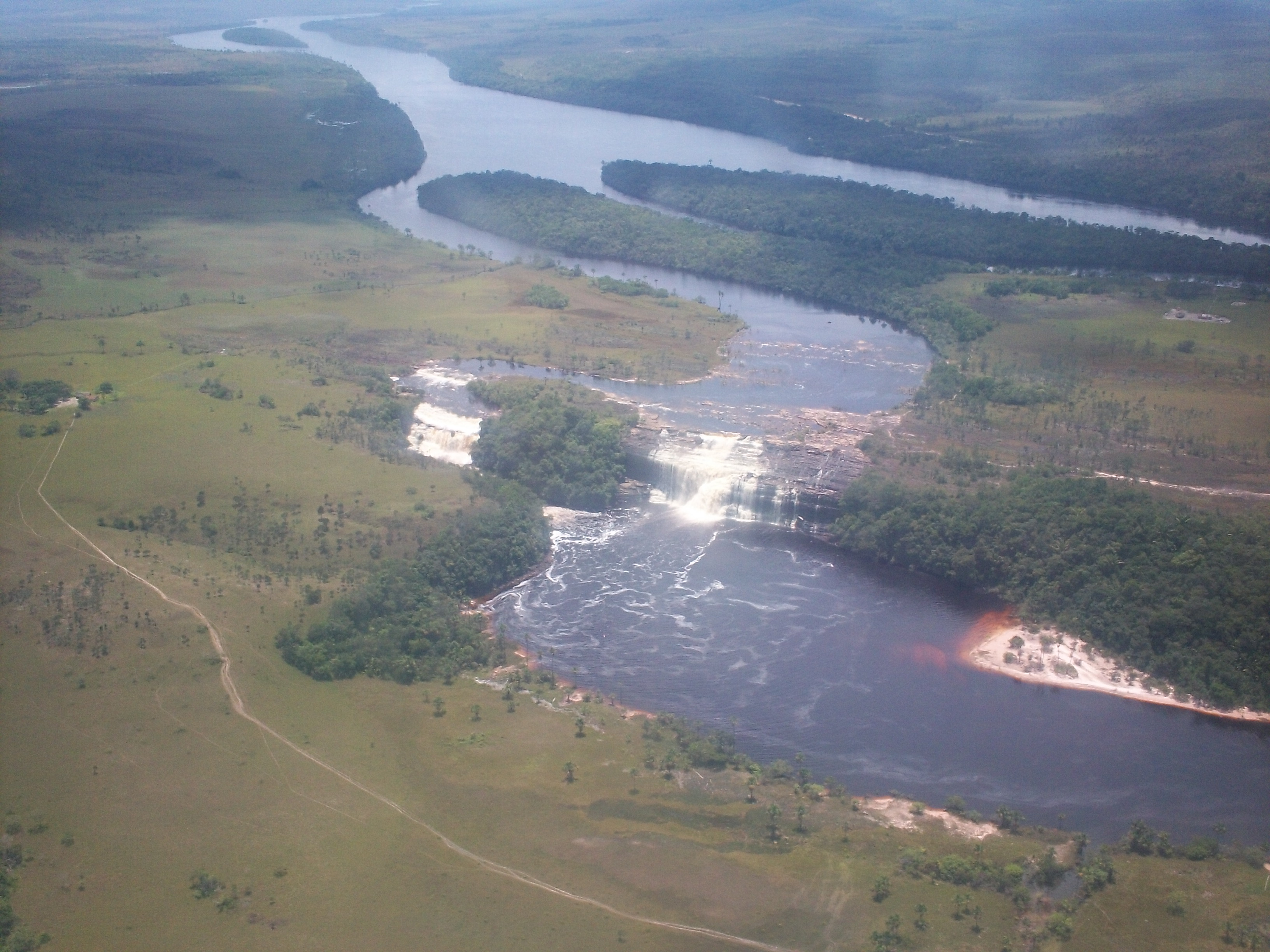 Ningun otra.